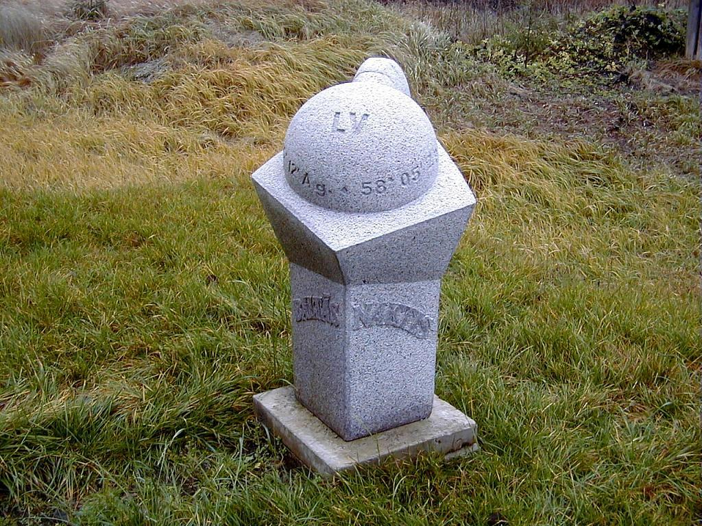 Ipiķu apkārtne, Latvijas Z zīme "Baltās naktis" 2000-11-11